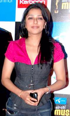 Bhumika Chawla at Mirchi Music Awards 2011